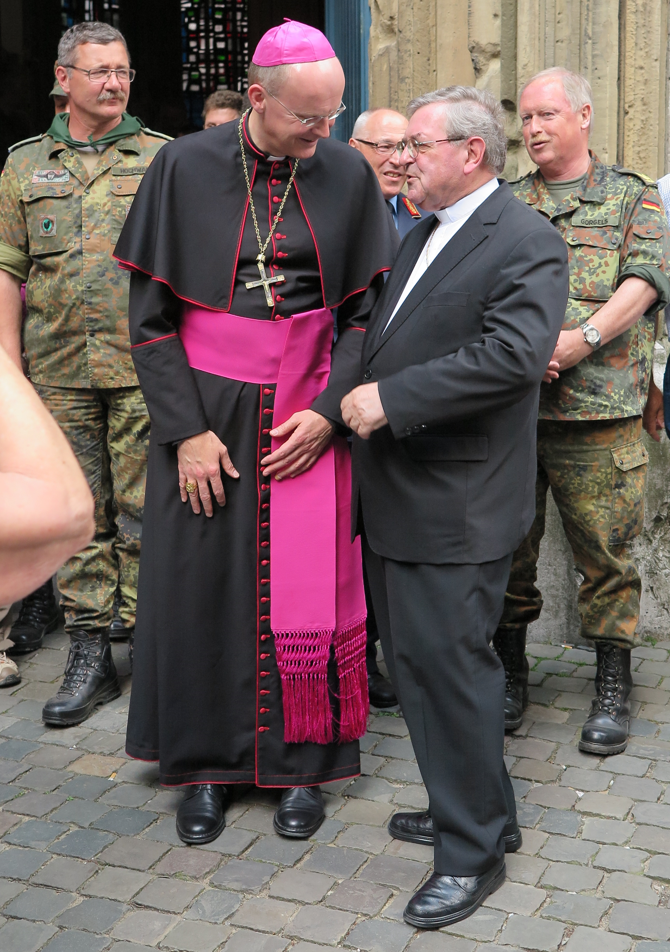 Militärbischof Franz-Josef Overbeck (Diözesanbischof des Bistums Essen) und Bischof Heinrich Mussinghoff (Diözesanbischof des Bistums Aachen) im Gespräch vor der Kirche St. Foillan in Aachen nach einem Pilgergottesdienst für die Bundeswehr anlässlich der Aachener Heiligtumsfahrt 2014. In zweiter Reihe: Brigadegeneral Michael Hochwart (links), Brigadegeneral Rainer Keller (mitte, leicht verdeckt) und Brigadegeneral Peter Gorgels (rechts). Zuvor war Bischof Overbeck zusammen mit Soldatinnen und Soldaten zu Fuß von Kornelimünster (Heiligtumsfahrt Kornelimünster) nach Aachen gepilgert.